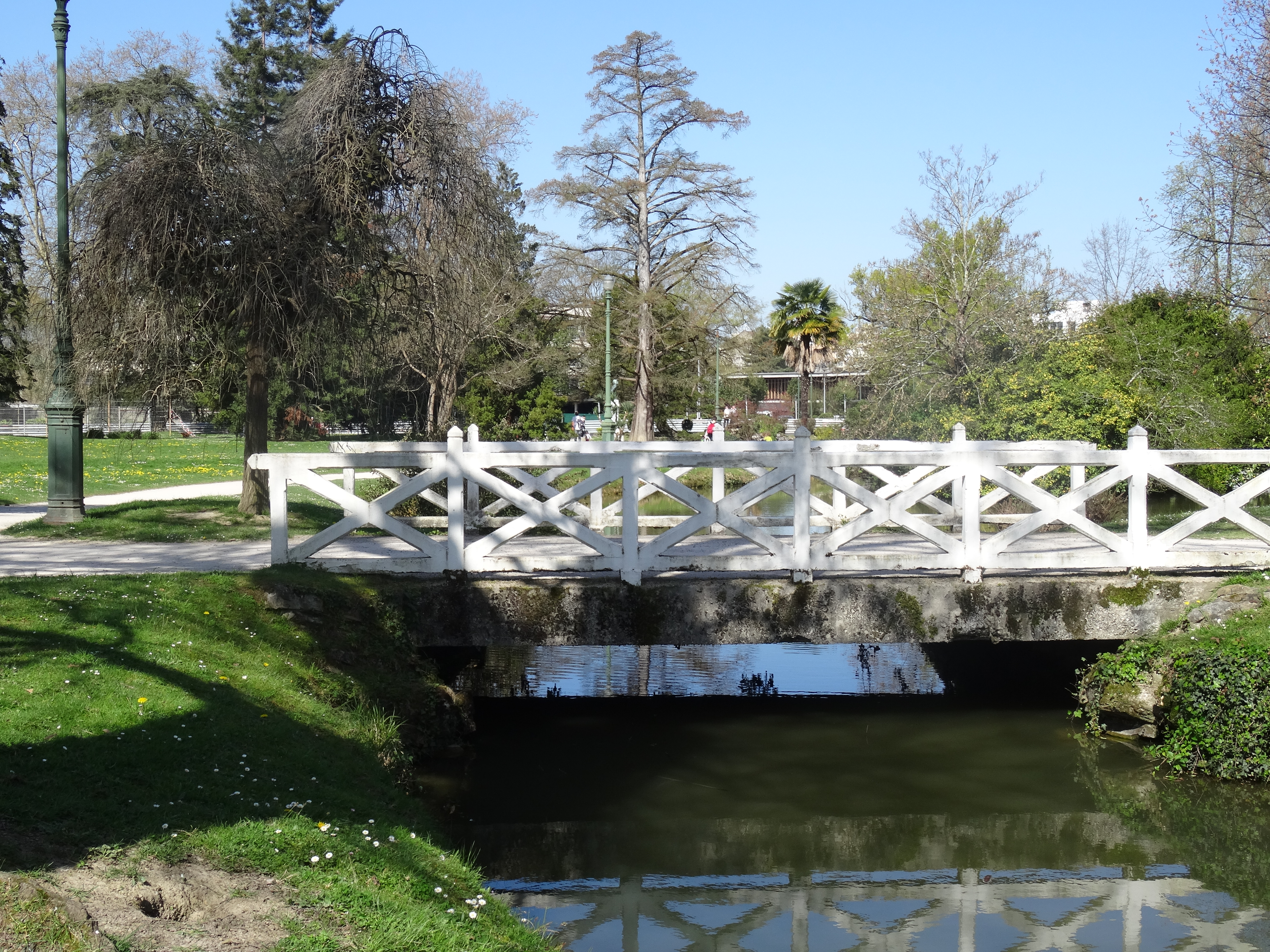 Pont du parc Beaumont de Pau